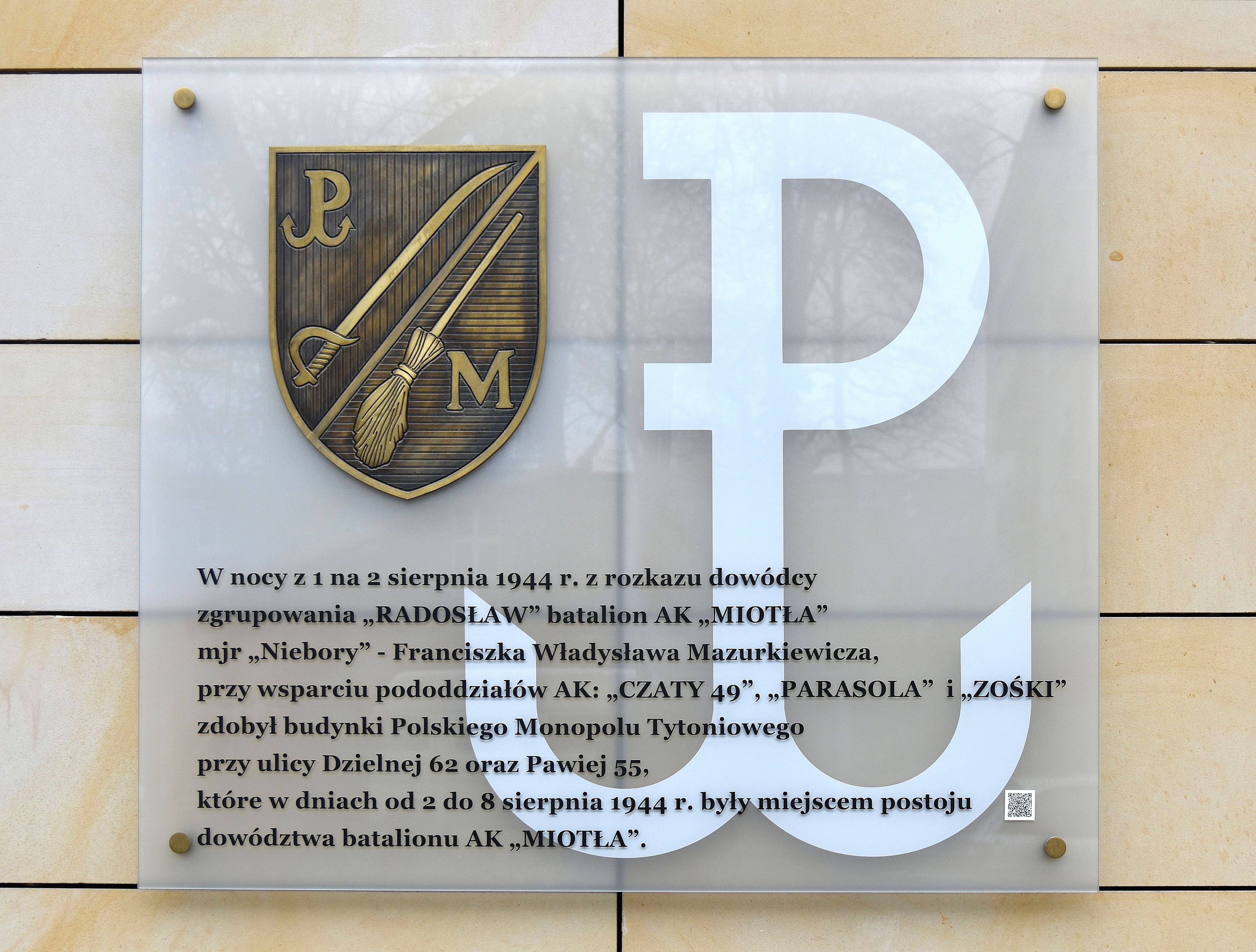 Tablica upamiętniająca batalion AK Miotła przy ul. Dzielnej 60 w Warszawie